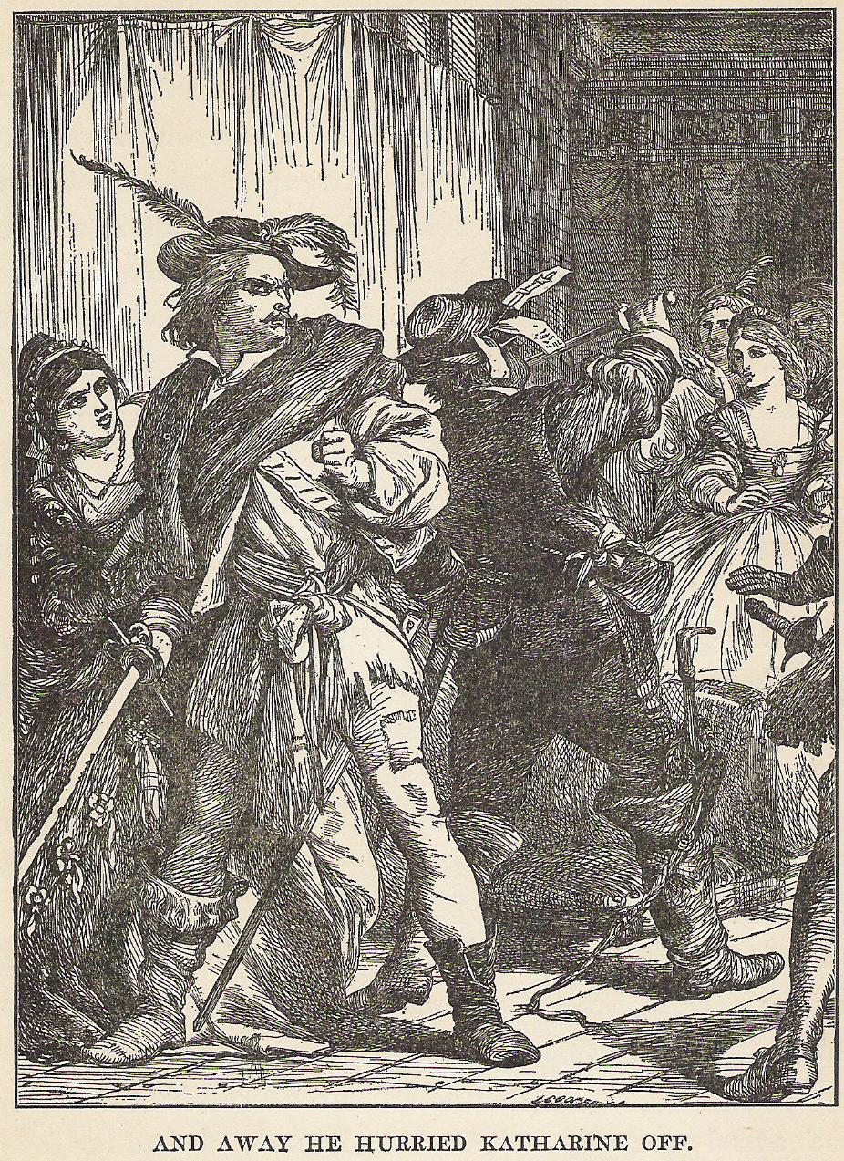 Illustration